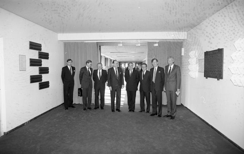 Zusammenkunft der ersten Gesprächsrunde nach der in Ottawa vereinbarten Formel "2+4" zu den äußeren Aspekten der deutschen Vereinigung auf Beamtenebene in Bonn am 14. März 1990 unter Leitung des politischen Direktors des Auswärtigen Amts, Ministerialdirektor Dr. Dieter Kastrup - im Auswärtigen Amt.